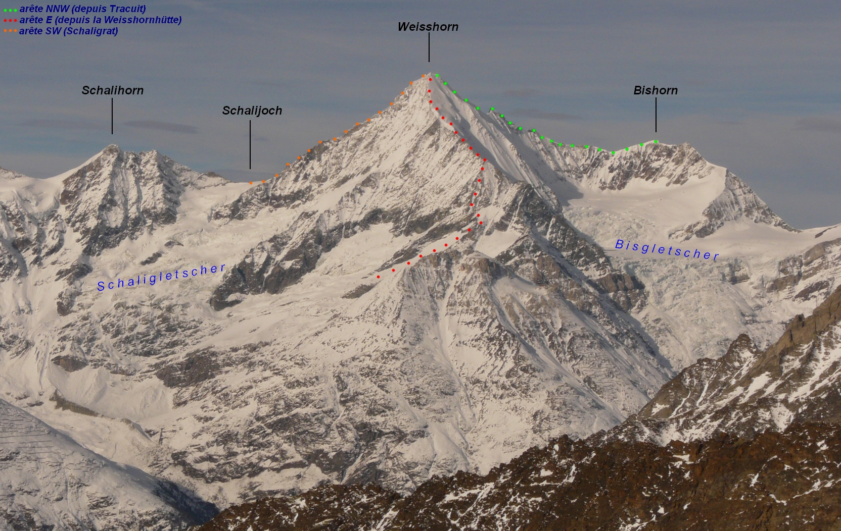 Tracciato delle tre principali vie di salita del Weisshorn